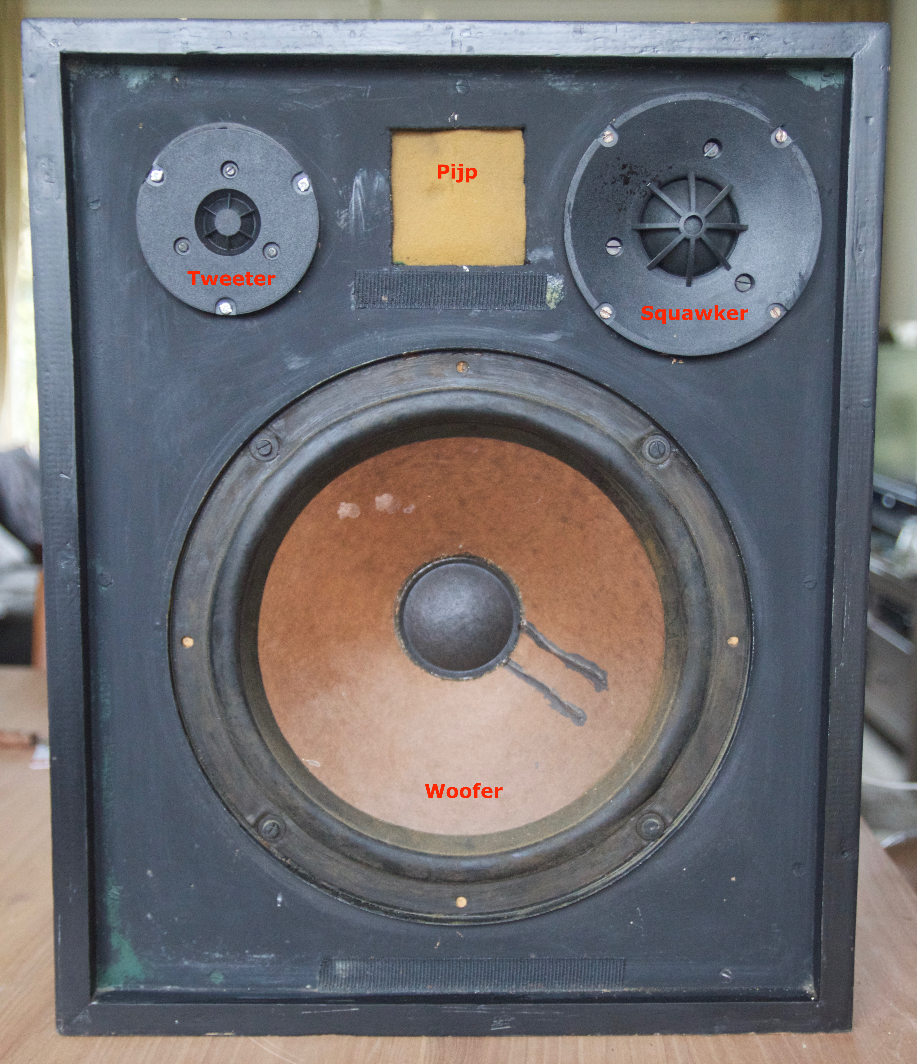 Afbeelding van de voorkant van een gedempt luidspreker systeem